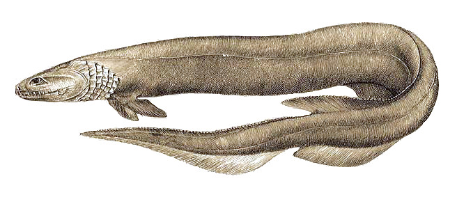 Chlamydoselachus anguineus